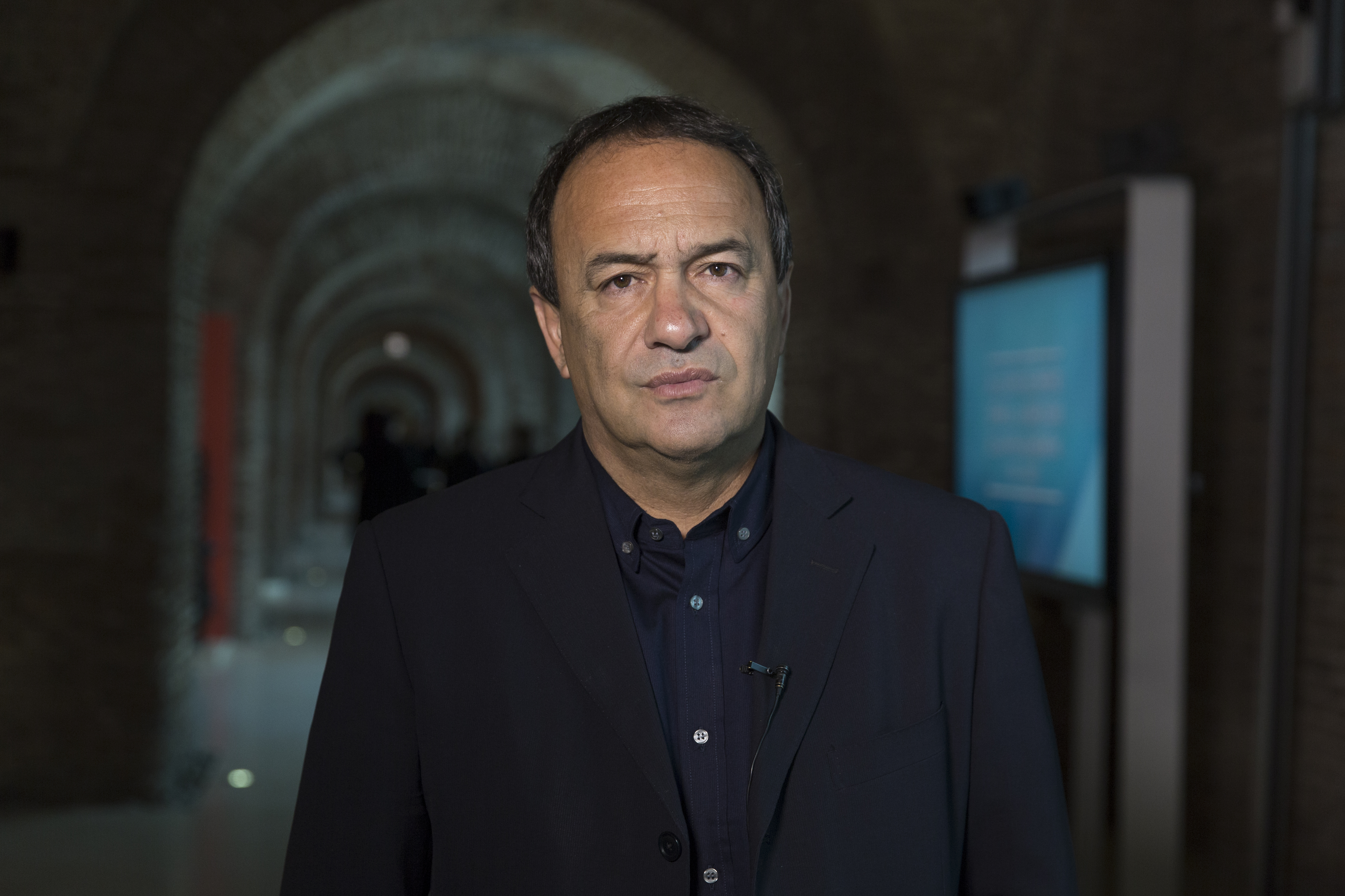 Buenos Aires, 3 de julio de 2017.- Se llevó a cabo la primer jornada de Diálogos Globales en el Museo Casa Rosada. Foto: Soledad Amarilla / Ministerio de Cultura de la Nación